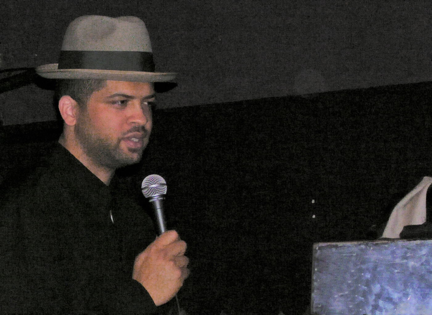 Jason Moran in Köln, Stadtgarten, Url